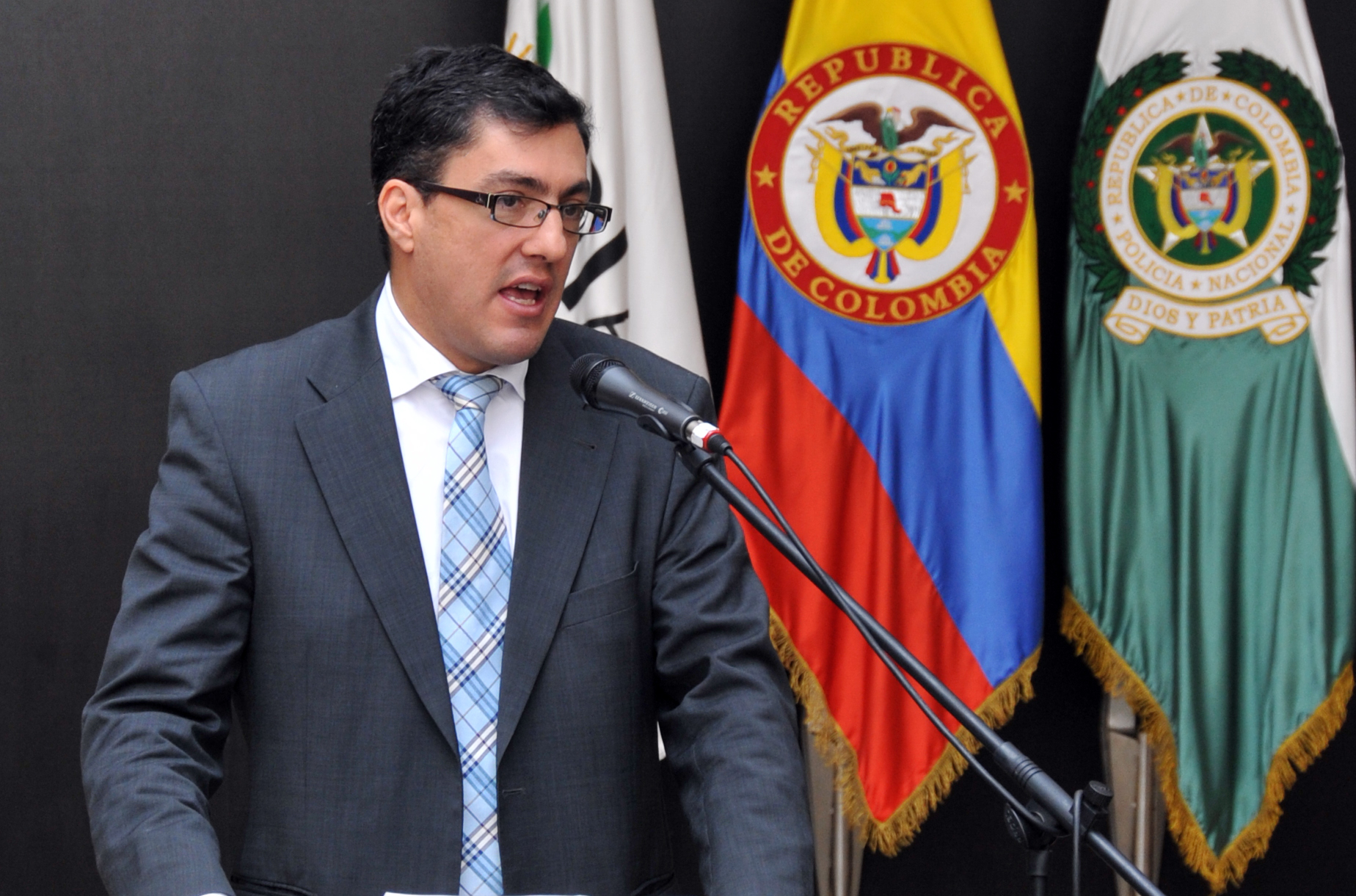 Director de la DIAN, Juan Ricardo Ortega